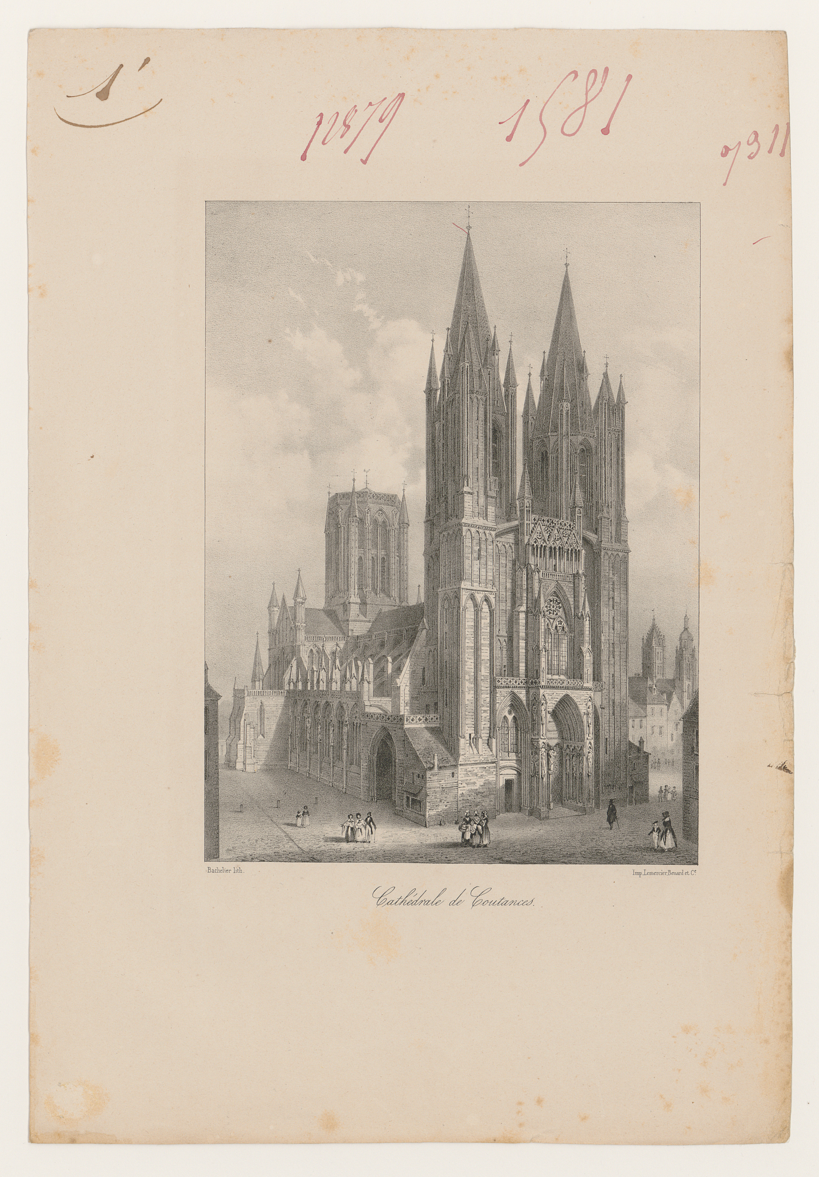 Cathédrale de Coutances. Imprimé par Lemercier Vernard et Cie. Lithographié par Bachelier. Sans date. Gravure issue des dossiers de travaux de restauration des cathédrales (1802-1912), conservés aux Archives nationales (inventaire et autres documents numérisés consultables en ligne).